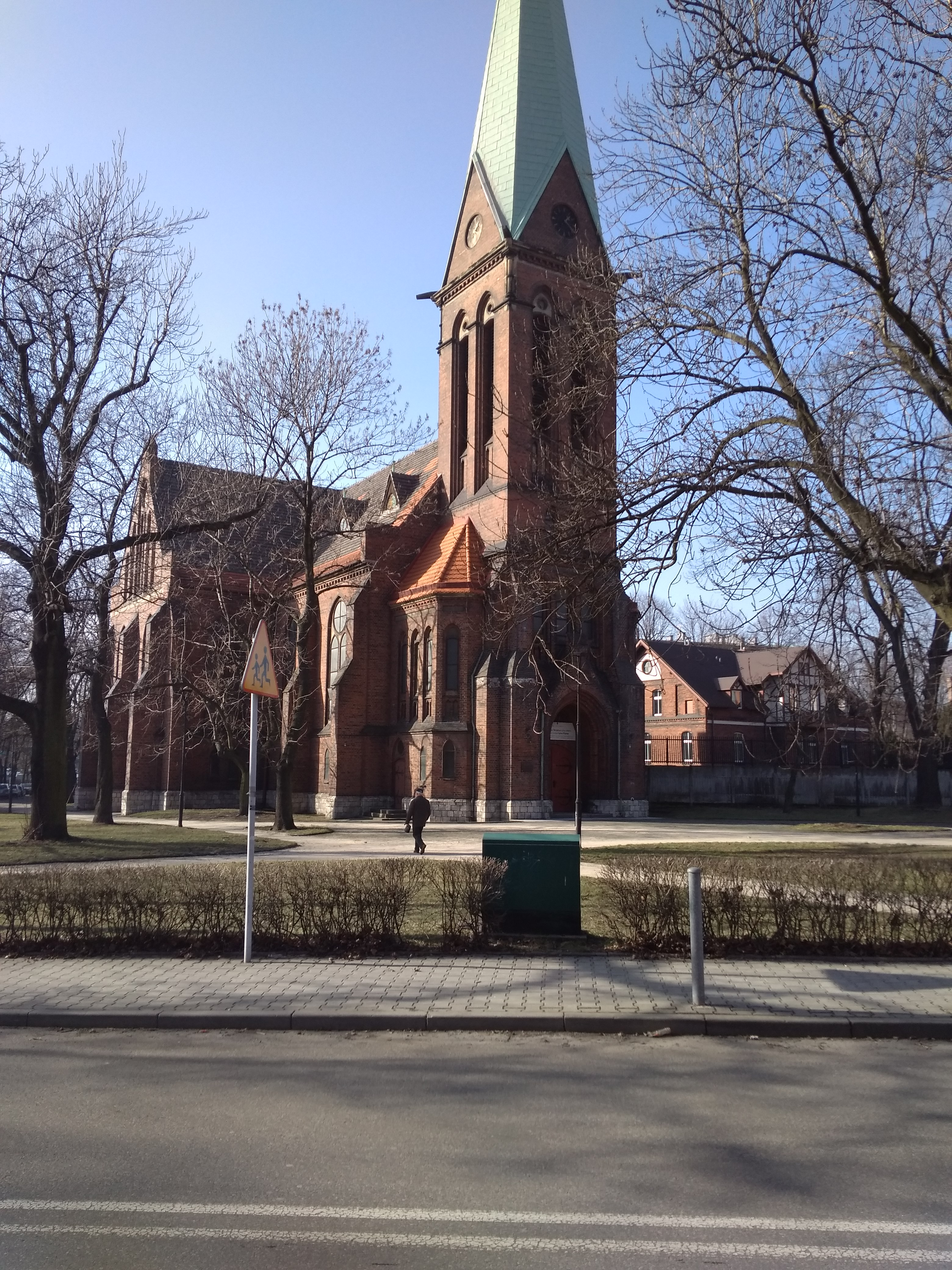 Kościół Ewangelicko-Augsburski im.Marcina Lutra w Siemianowicach Śląskich